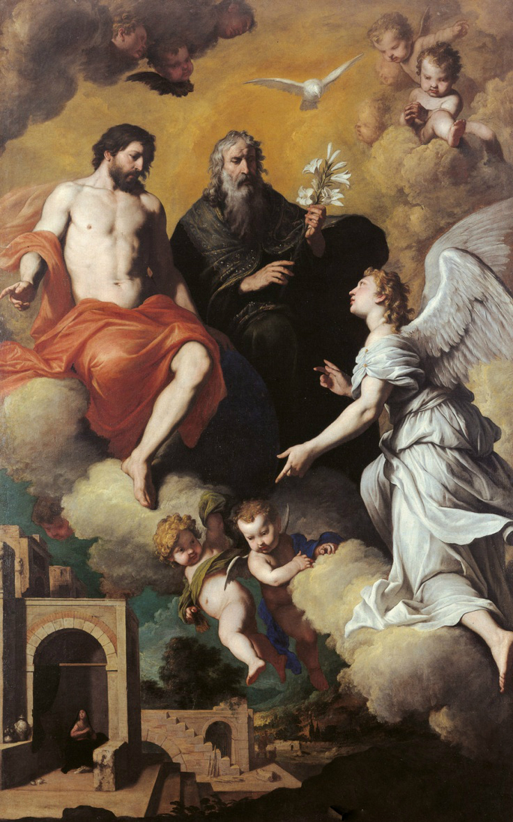 San Gabriele Arcangelo inviato dalla Trinità alla Vergine Maria